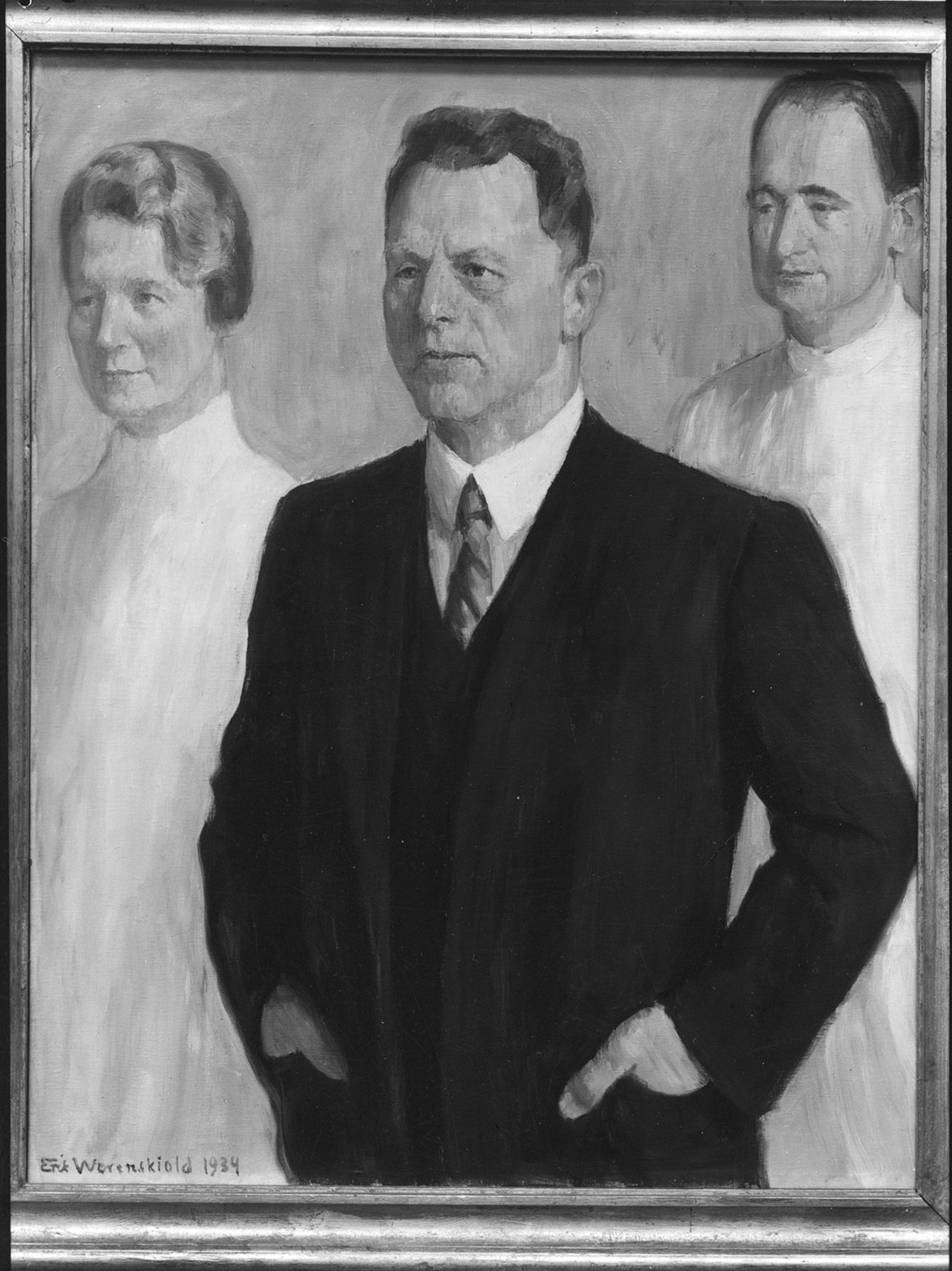 Dr. Lorange på venstre og dr. Schreiner på høyre side.